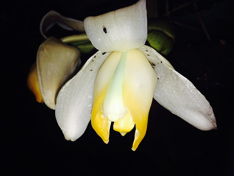 STANHOPEA TRICORNIS EN MINDO- ECUADOR